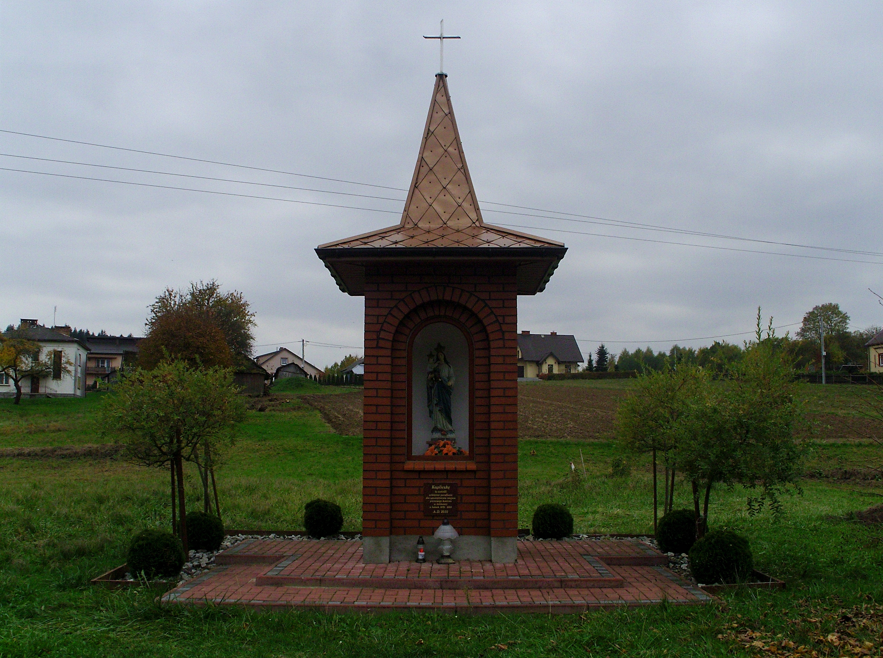 Kapliczka w Jabłonicy w miejscu dawnej kaplicy - kościoła filialnego parafii Imienia Maryi i św. Mikołaja w Bączalu Dolnym.